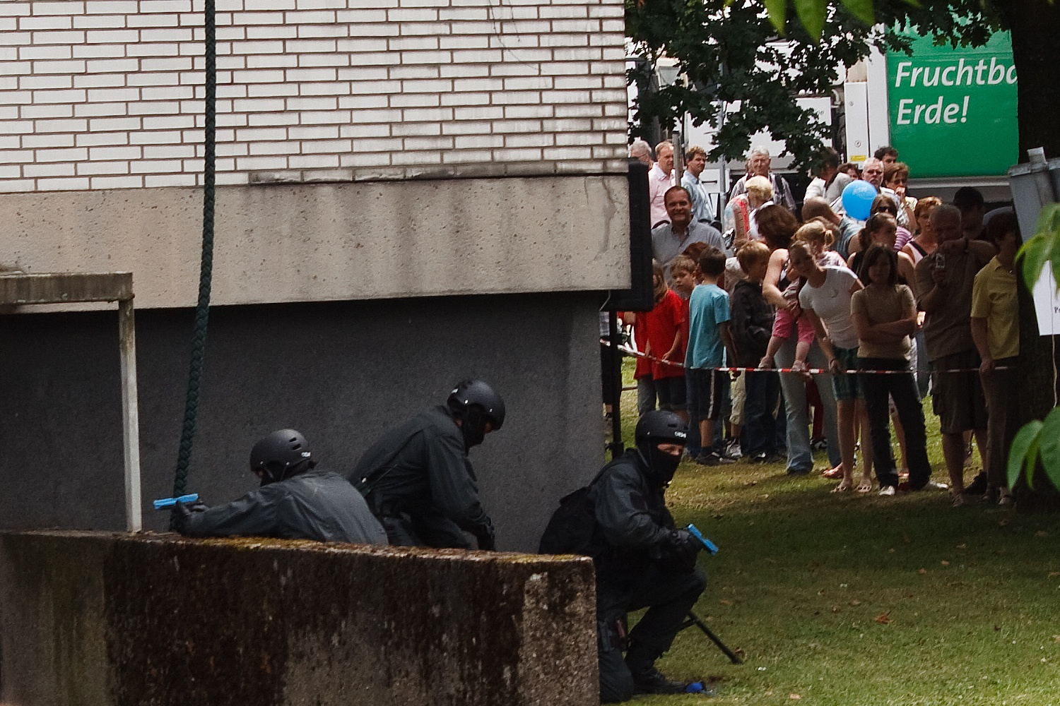 SEK der Polizei, NRW-Tag Hamm 2009, Datum/Uhrzeit: 28.06.2009 15:04:14